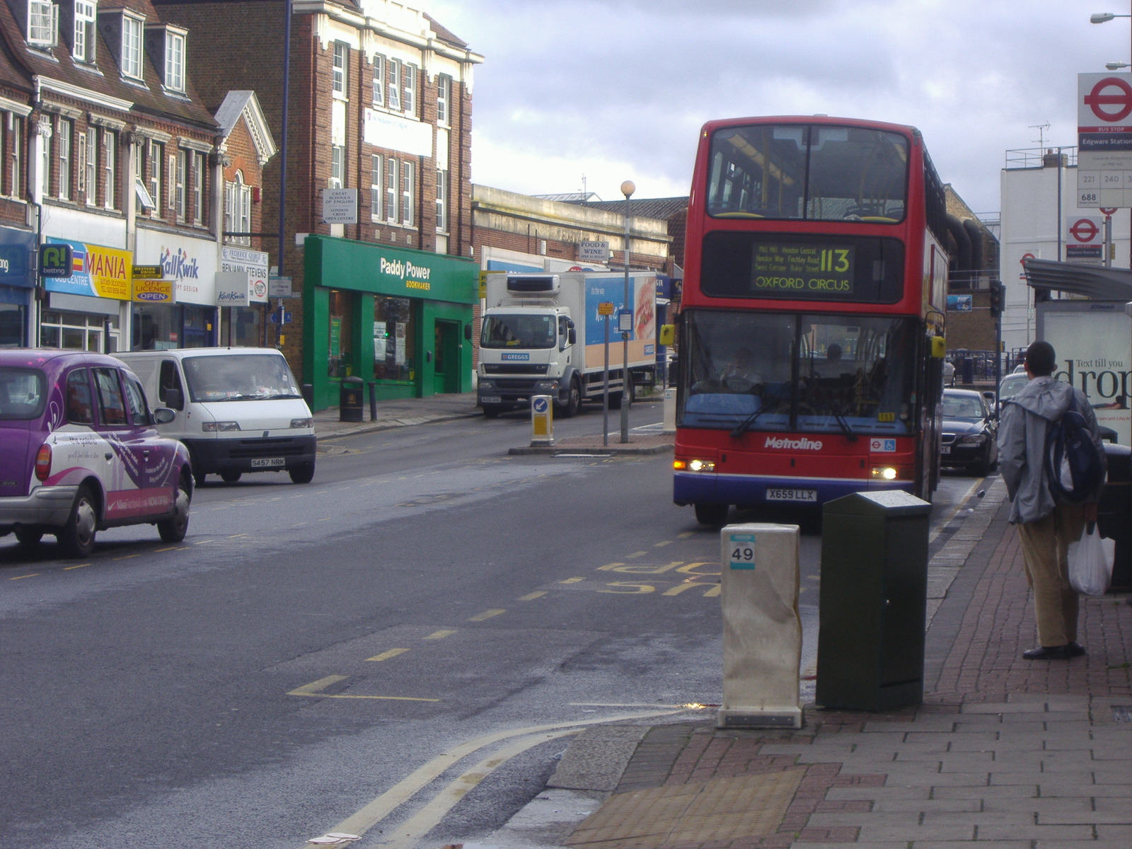 113 Edgware